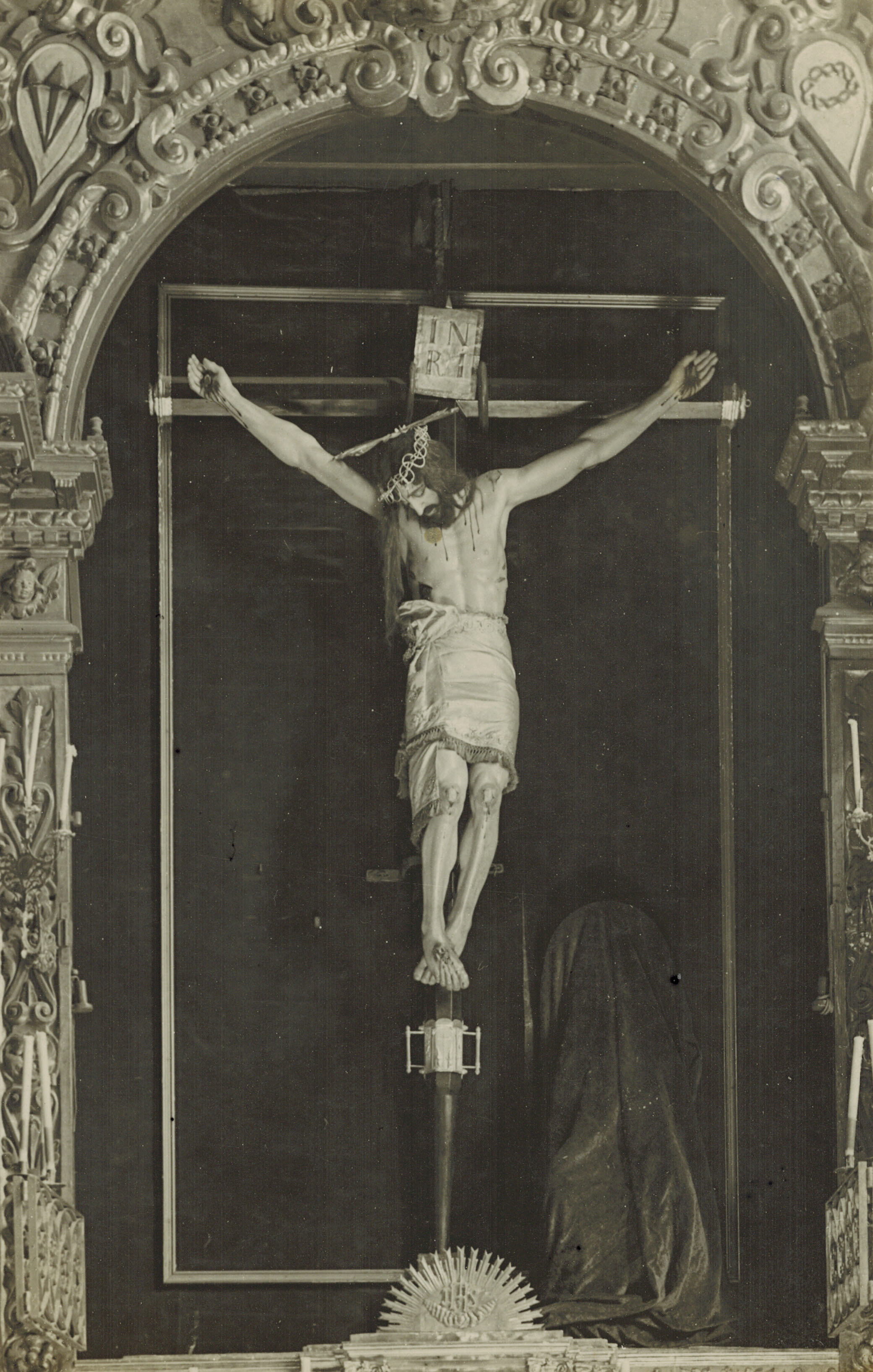 Sant Crist de la Sang. Jeroni Xanxo, segona meitat del segle XVI. (destruït 1936)